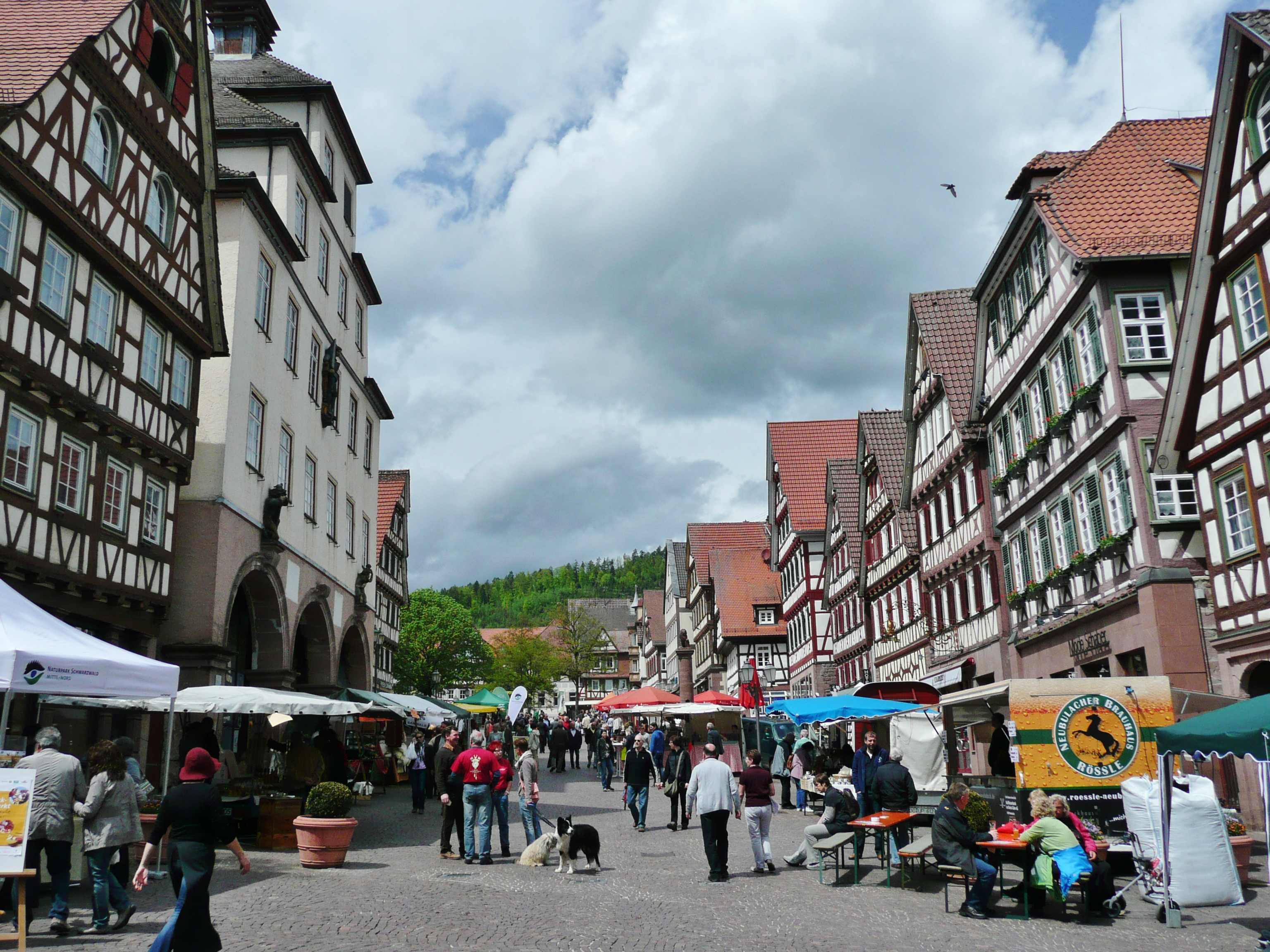 Marktplatz Calw